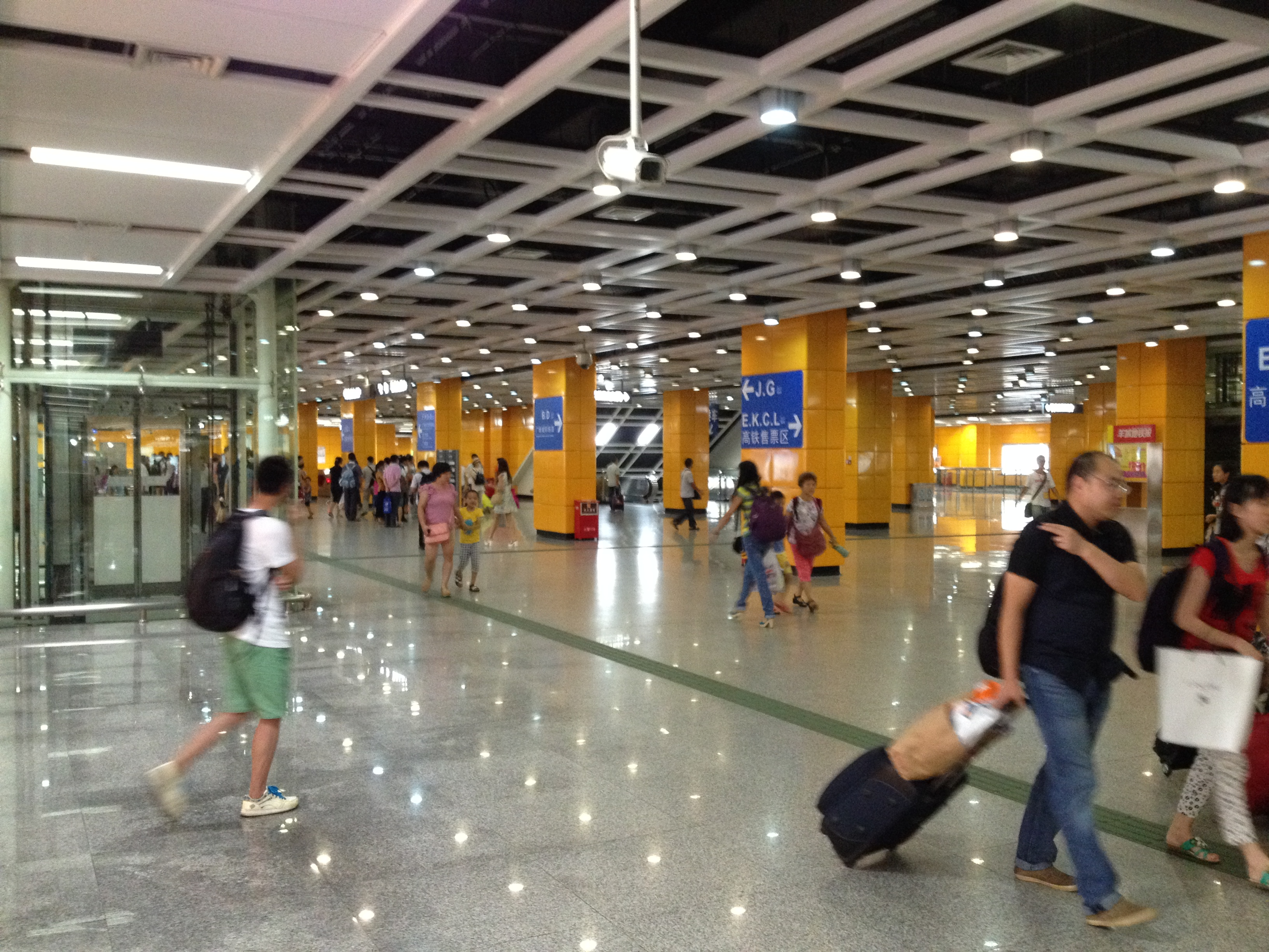 地铁广州南站车站付费区大堂